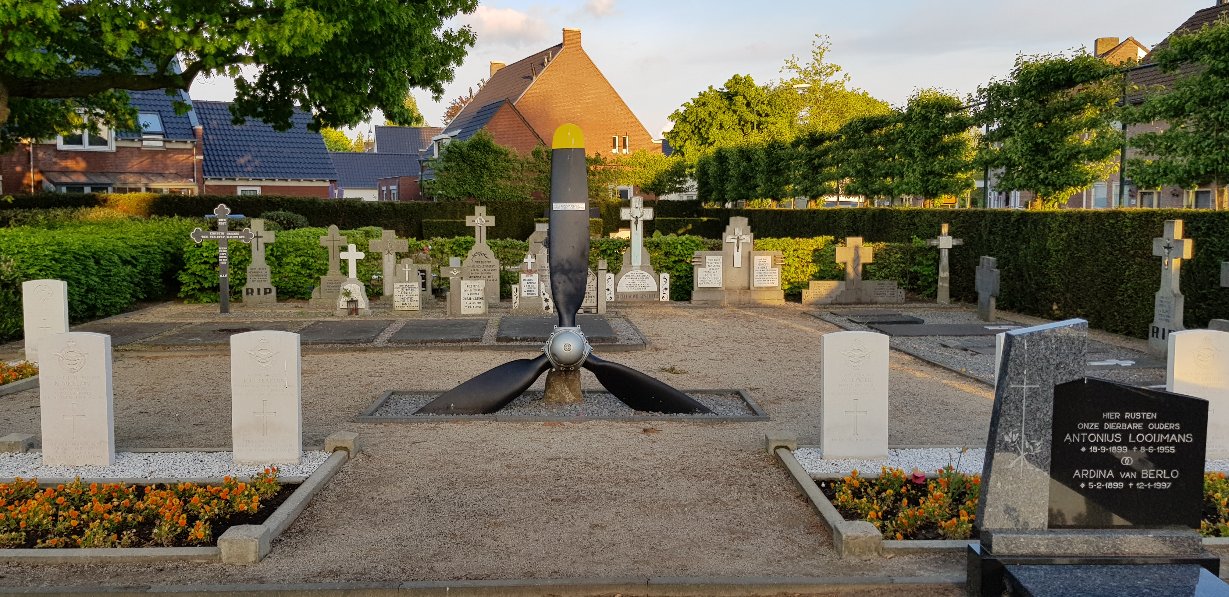 Het monument voor Britse vliegers op het kerkhof in Erp. Genomen op het kerkhof in Erp op 2 mei 2019.